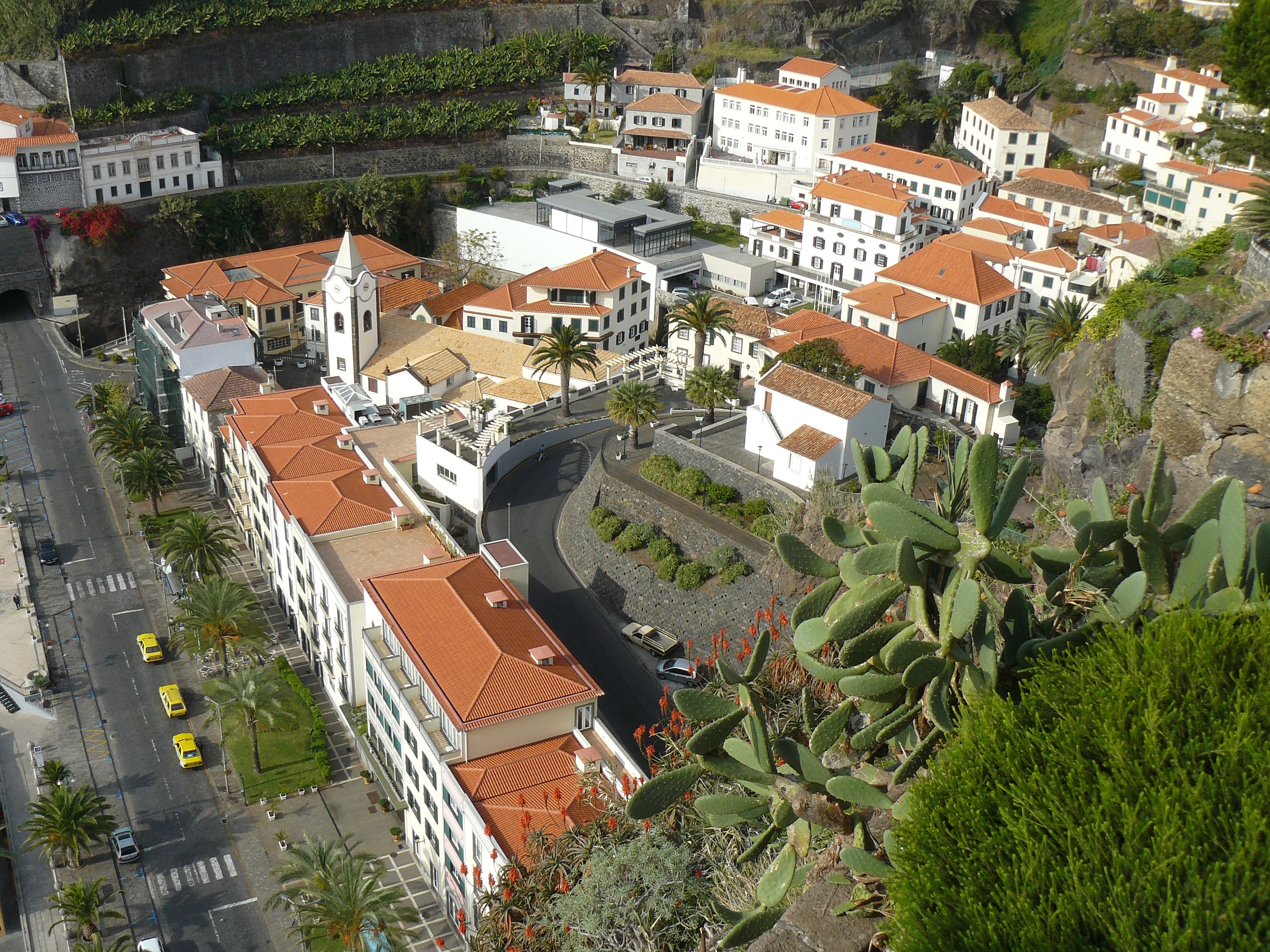 Vue de Ponta do Sol (Madère, Portugal)